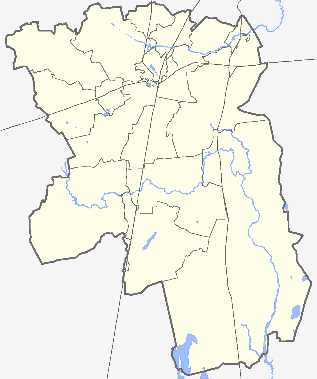 Карта Гатчинского района Ленинградской области